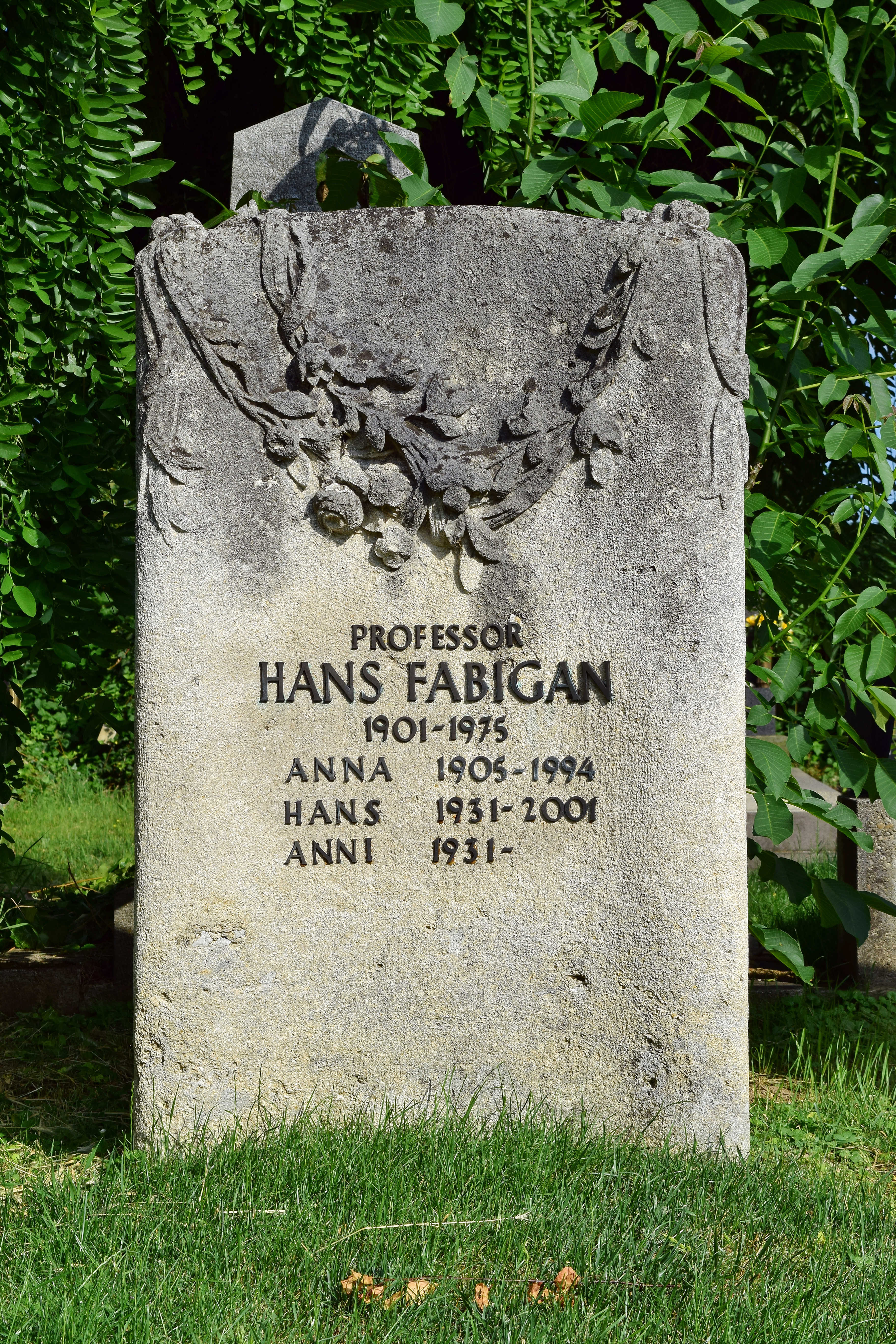 Ehrenhalber gewidmetes Grab von Hans Fabigan auf dem Wiener Zentralfriedhof, Gruppe 40.